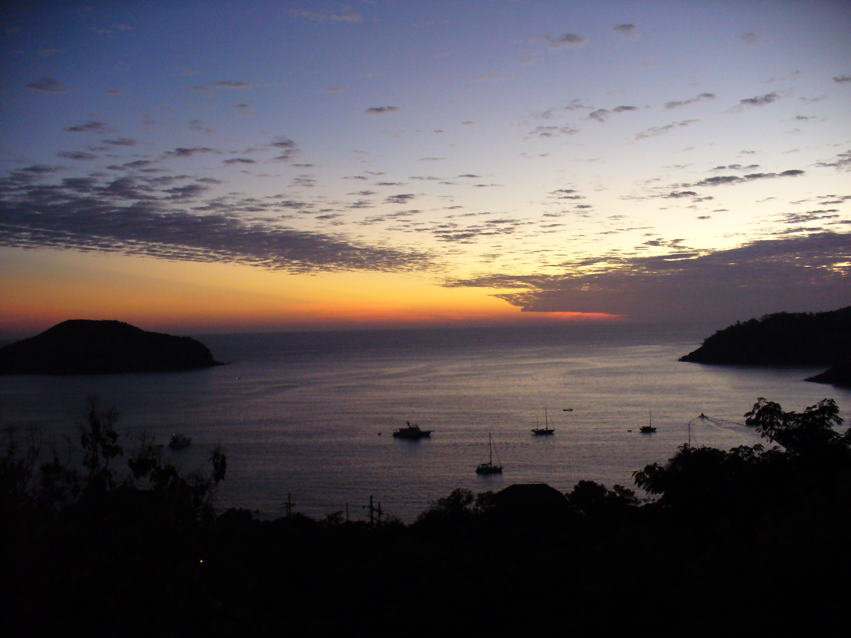 Ocaso en la Bahia de Zihuatanejo